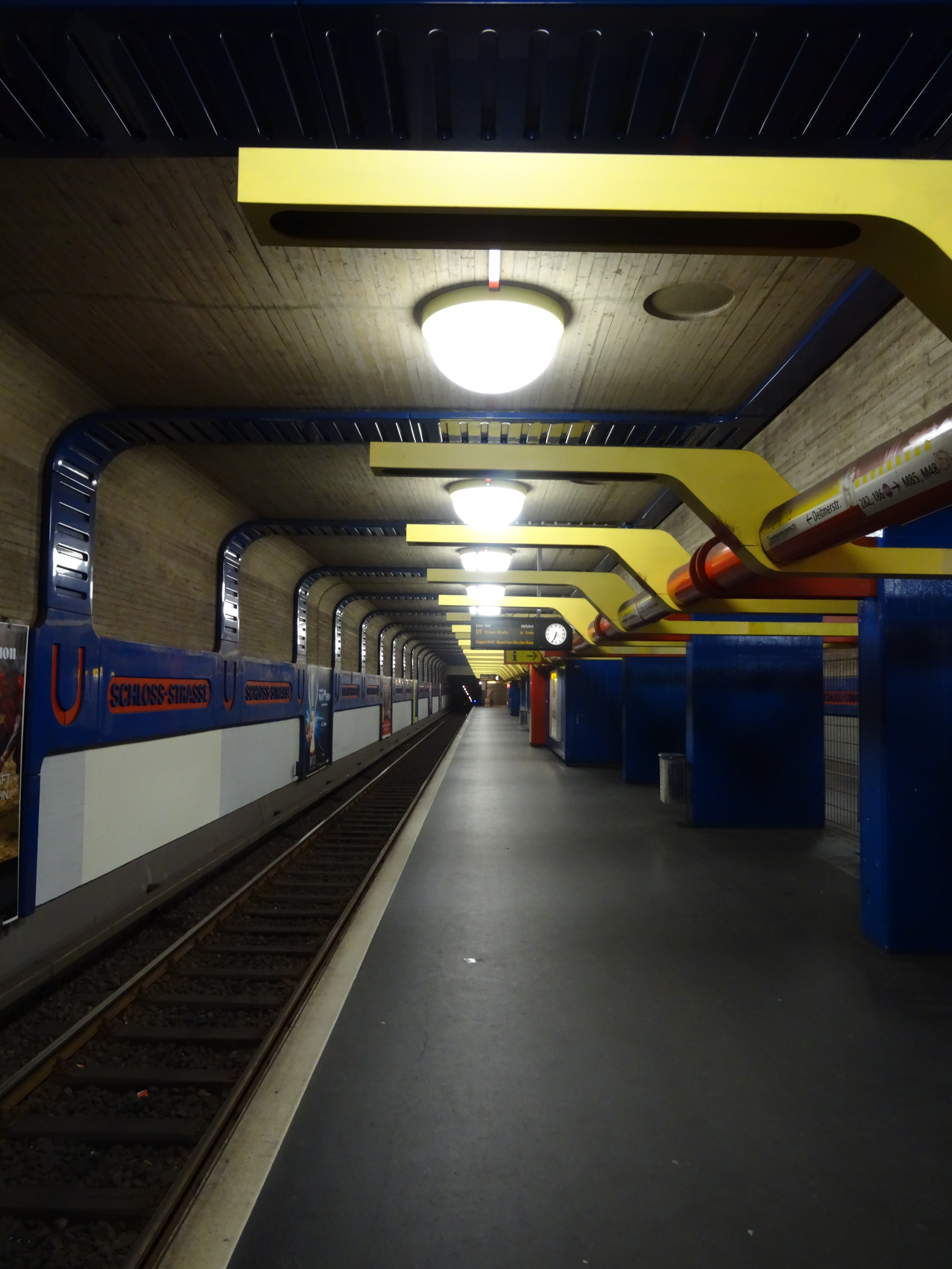 Linie U9 in Steglitz - Stand 01/2015. Der U-Bahnhof soll demnächst komplett umgebaut werden. Erste Veränderungen sind bereits sichtbar: Kugellampen an der Decke und grüne Farbproben.